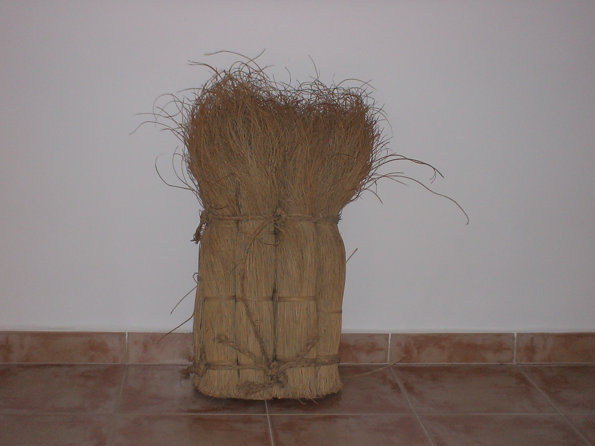 Esparto ready for crafts